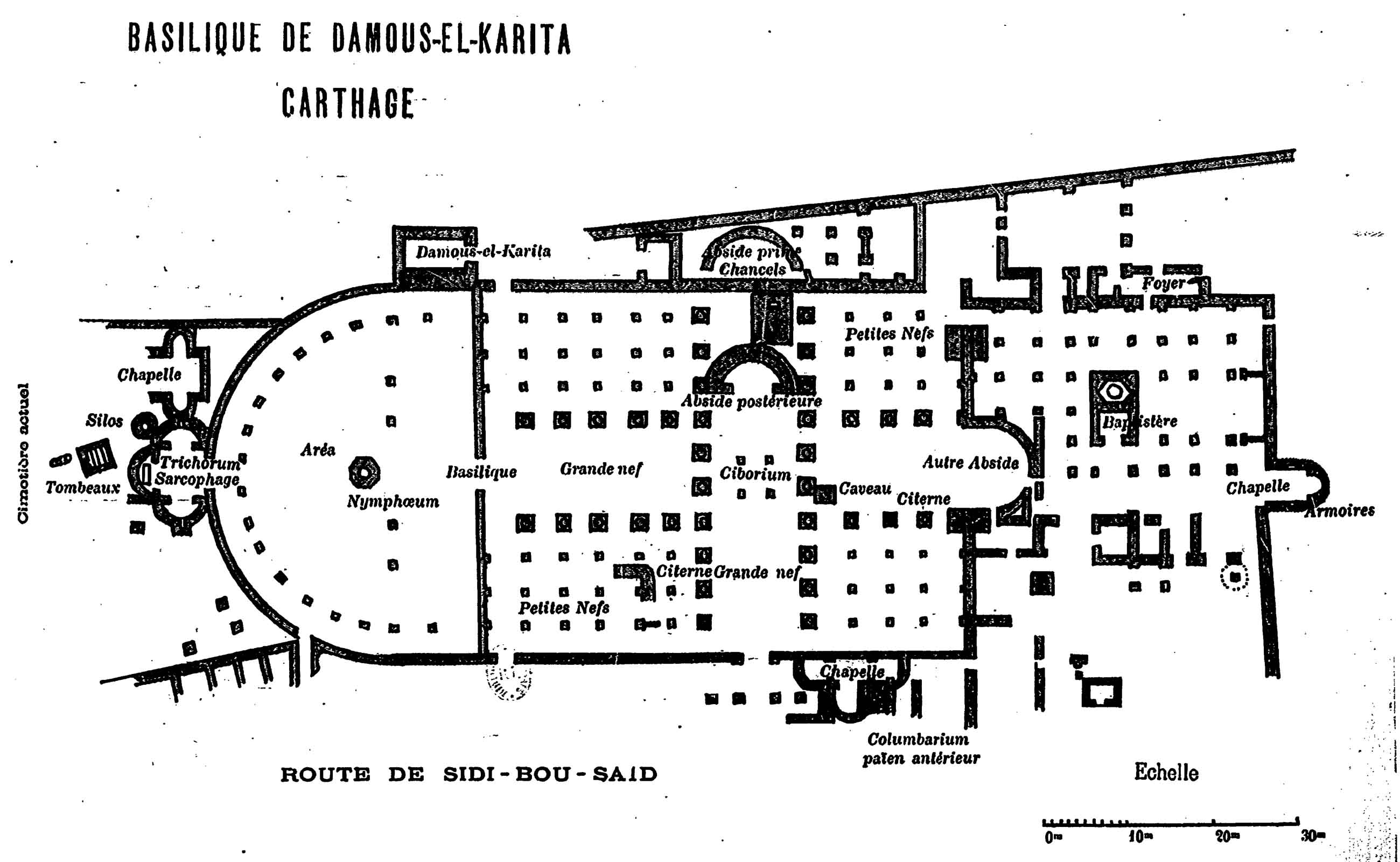 Carthage - Plan de la basilique de Damous Karita